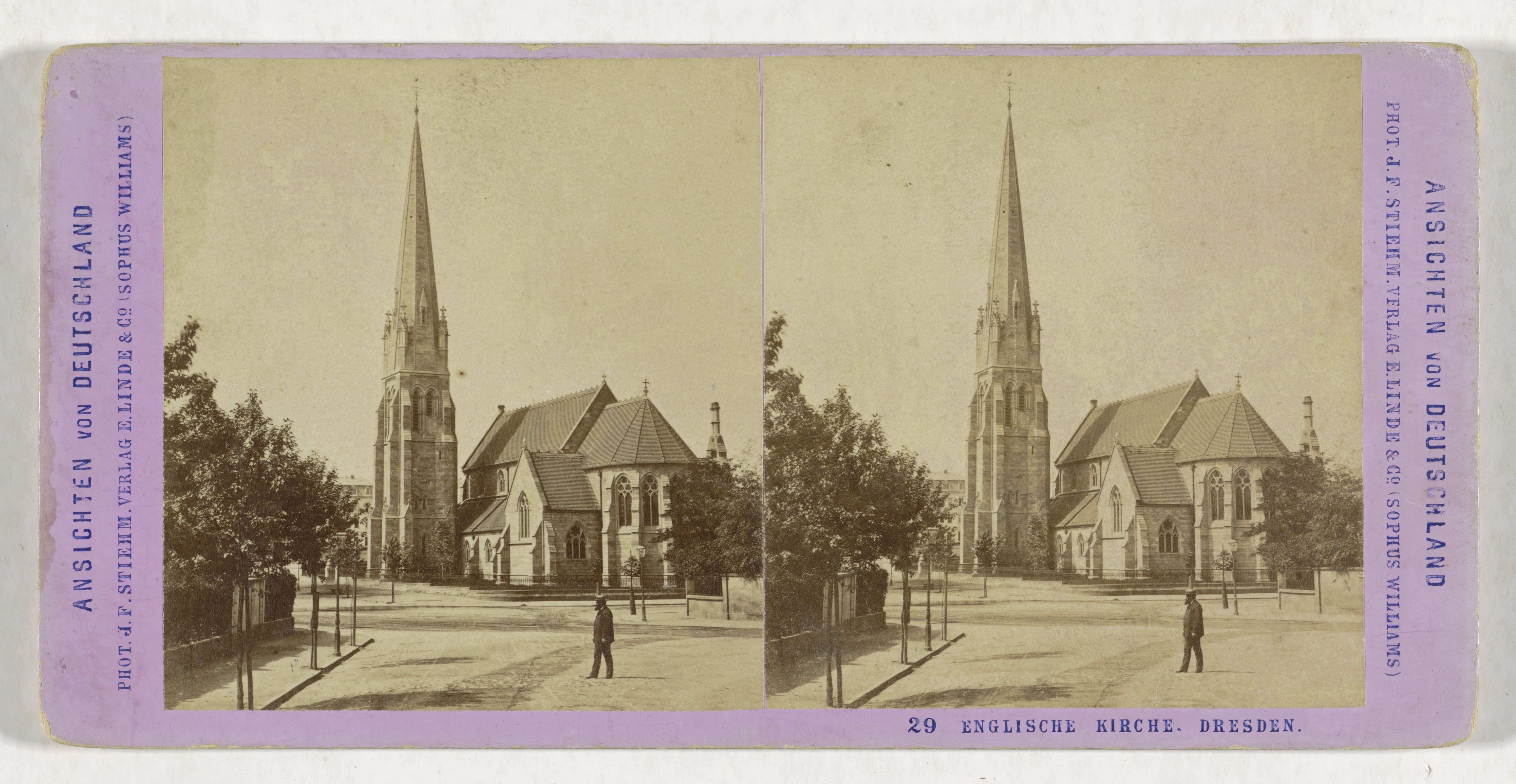 IdentificatieTitel(s): De Anglicaanse kerk All Saints' Church, Dresden; Englische Kirche. Dresden (titel op object); Ansichten von Deutschland (serietitel op object)Objecttype: stereofoto Objectnummer: RP-F-F13556Opschriften / Merken: nummer, recto, gedrukt: ‘29’VervaardigingVervaardiger: fotograaf: Johann Friedrich Stiehm (vermeld op object)uitgever: Sophus Williams & E. Linde & Co. (vermeld op object)Plaats vervaardiging: fotograaf: Dresdenuitgever: BerlijnDatering: 1869 - 1872Materiaal: karton fotopapier Techniek: albuminedrukAfmetingen: secundaire drager: h 86 mm × b 175 mmOnderwerpWat: church (exterior)Waar: DresdenVerwerving en rechtenVerwerving: overdracht van beheer 1994Copyright: Publiek domein